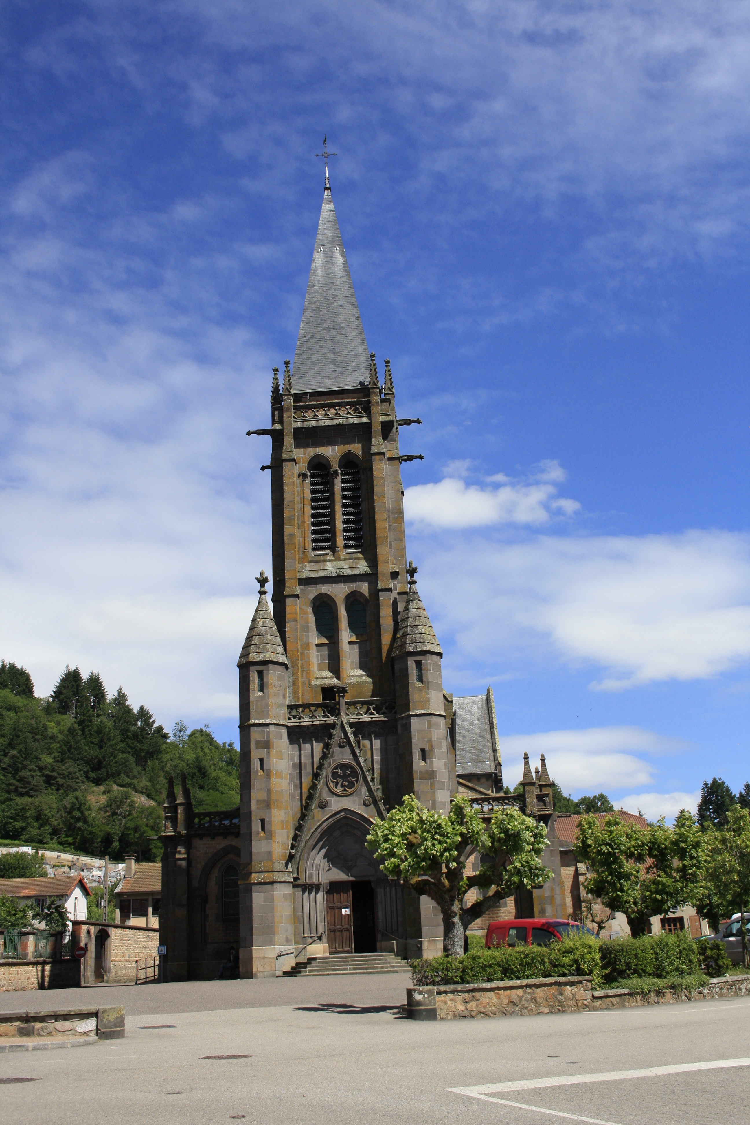 Sous le vocable de Sainte-Thérèse de l'Enfant Jésus